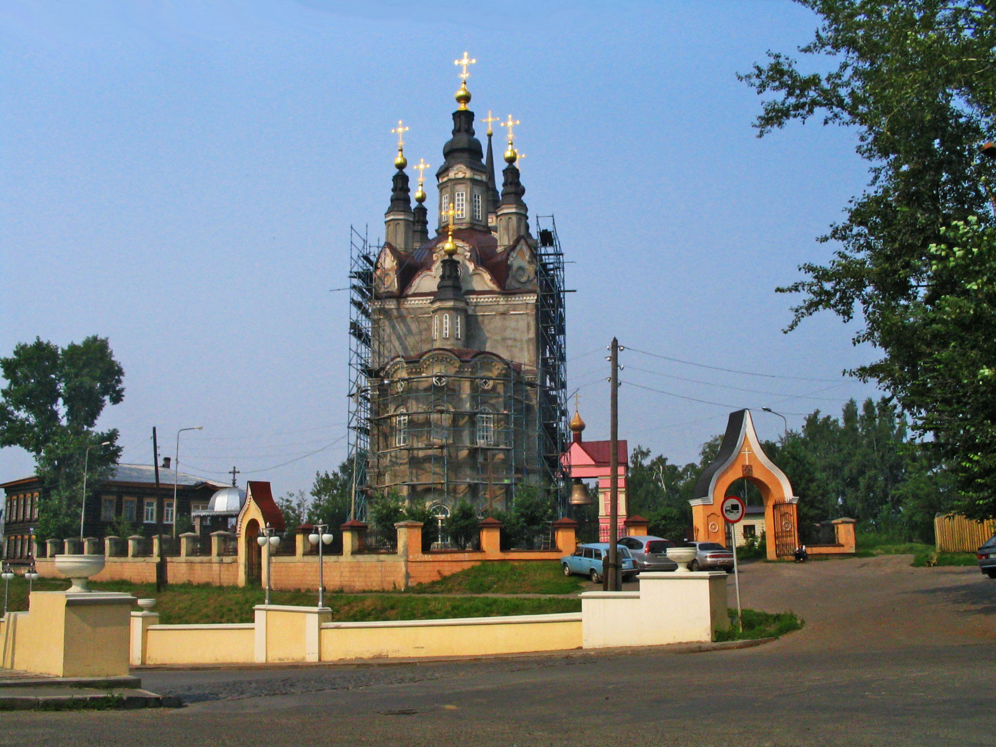 Voskresenskaya Church in Tomsk, Siberia RU: Воскресенская церковь в Томске